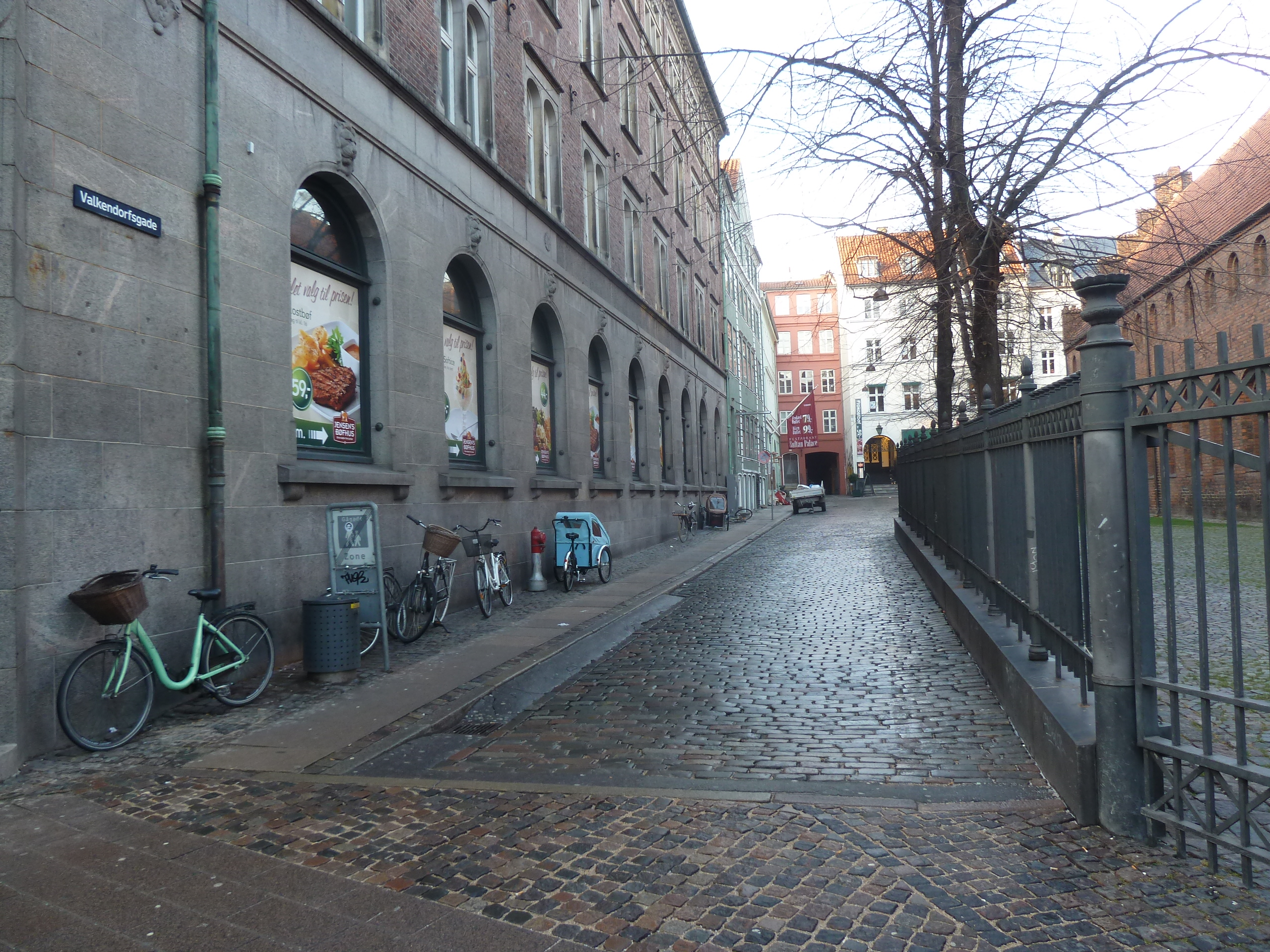 The street Valkendorfsgade in Indre By in Copenhagen.